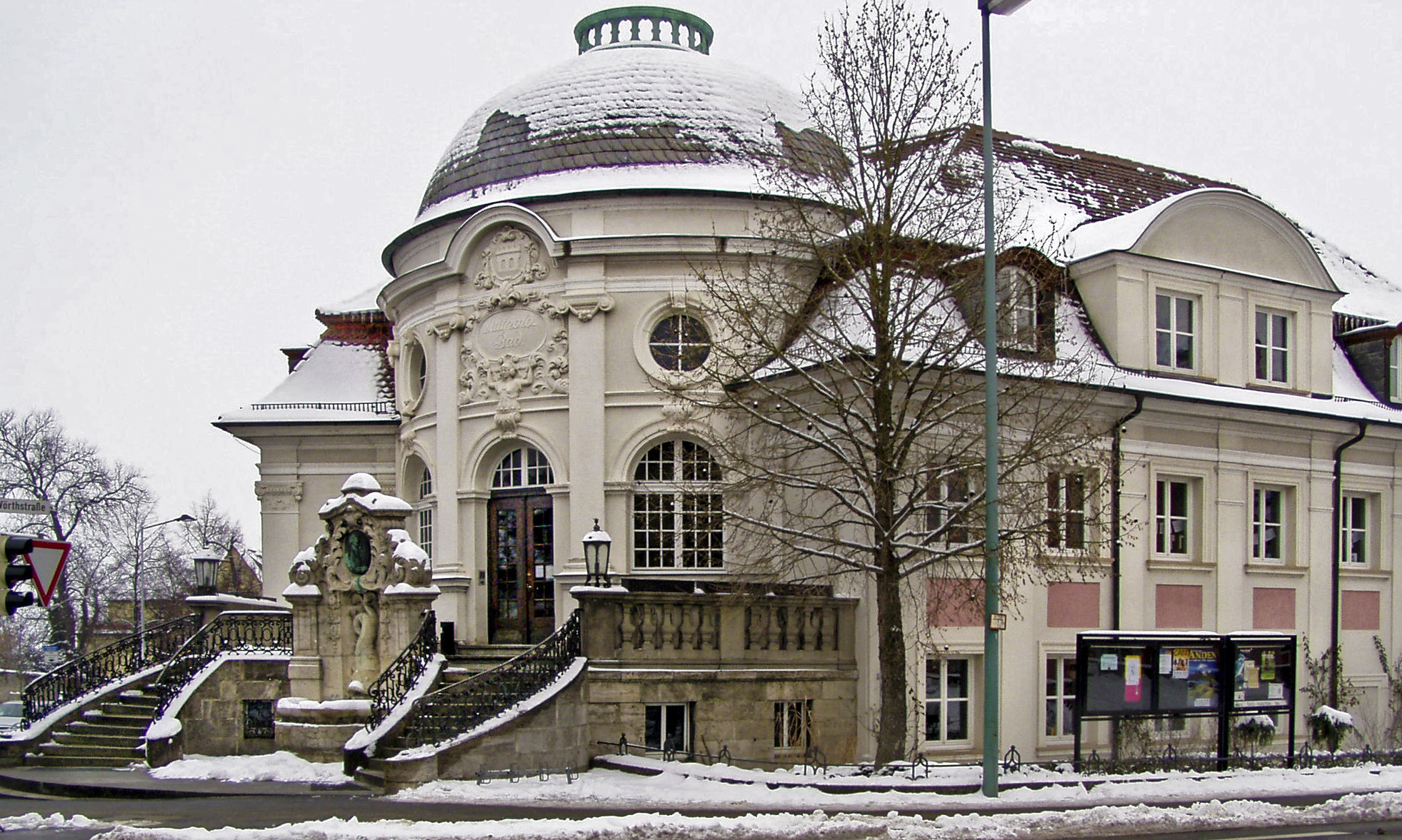 Das Kitzinger Luitpoldbad, ein Bau aus dem Jahr 1914. Hier befinden sich heute die Volkshochschule und Bücherei der Stadt Kitzingen.